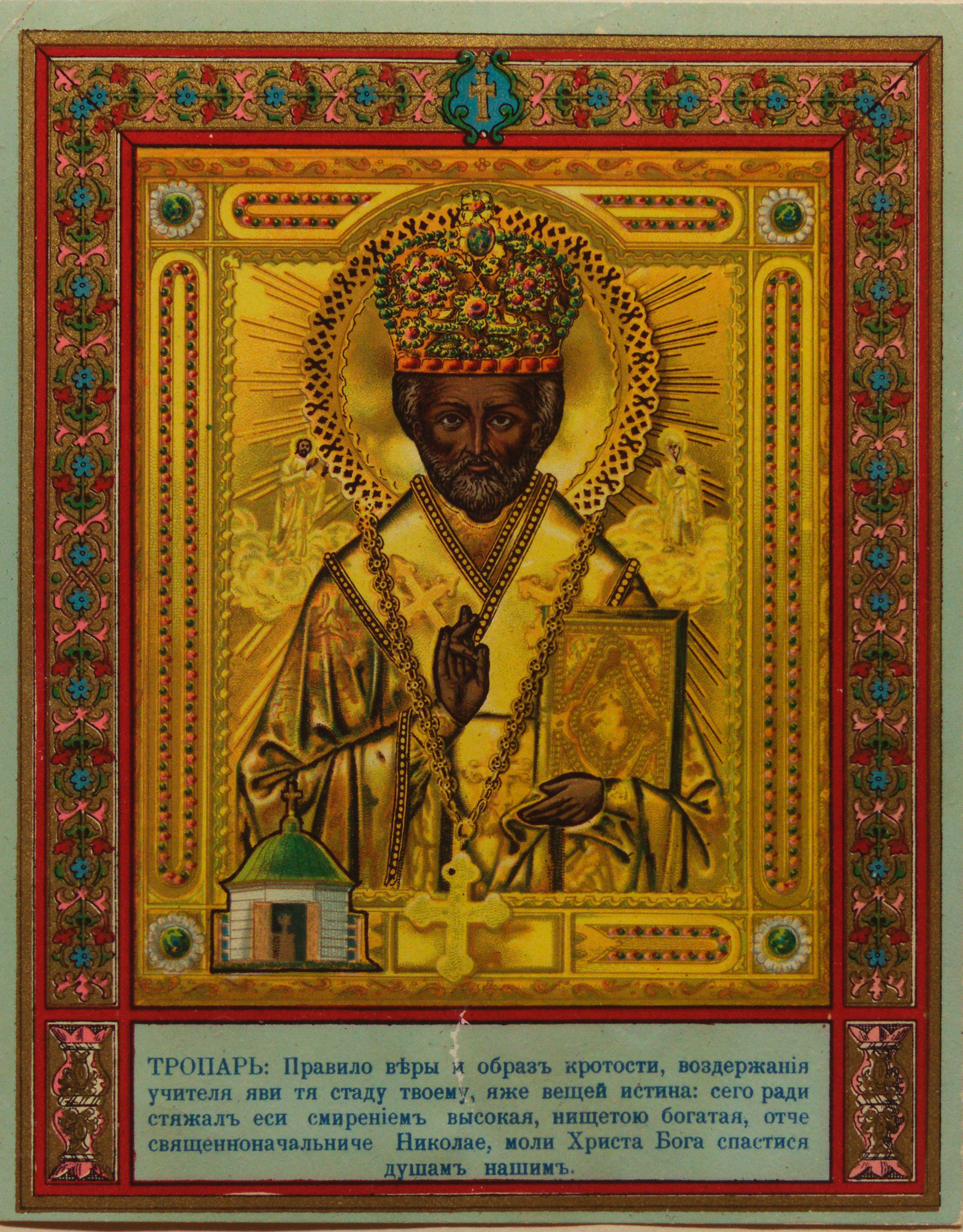 Лубок начала XX века из фондов Российской государственной библиотеки с изображением чудотворной иконы святого Николая Угодника, хранившейся в Валуйском Успенском Николаевском монастыре.